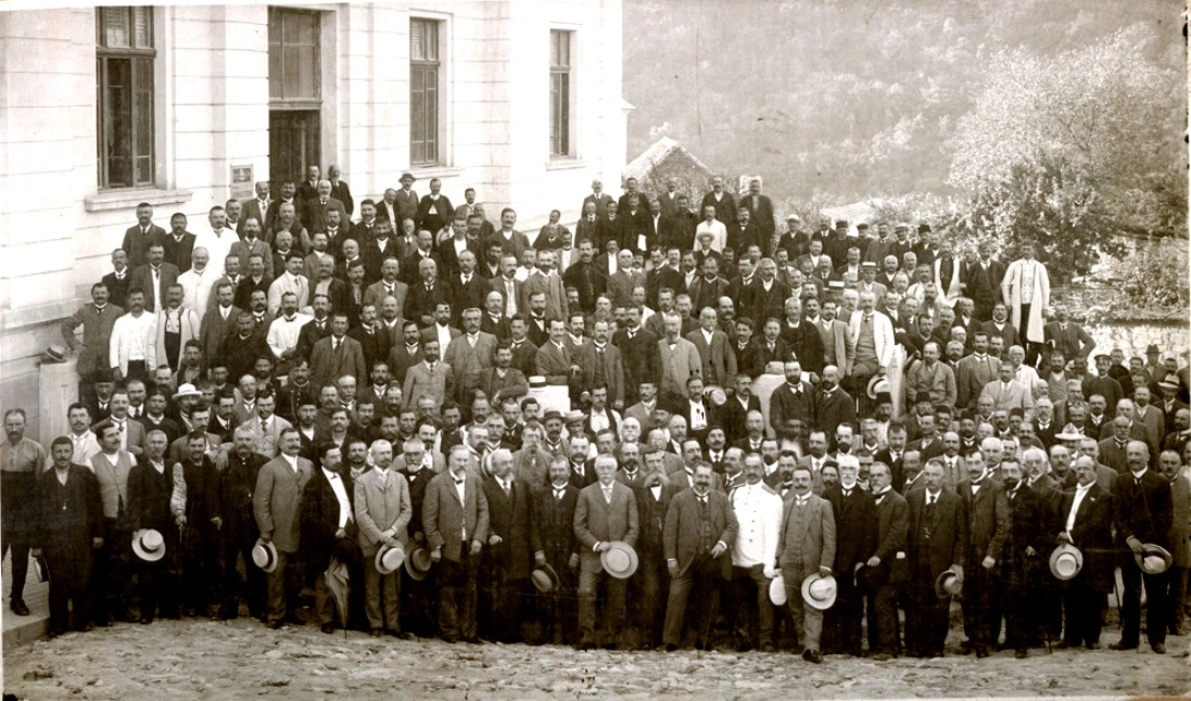 Депутати от V Велико Народно събрание, Търново